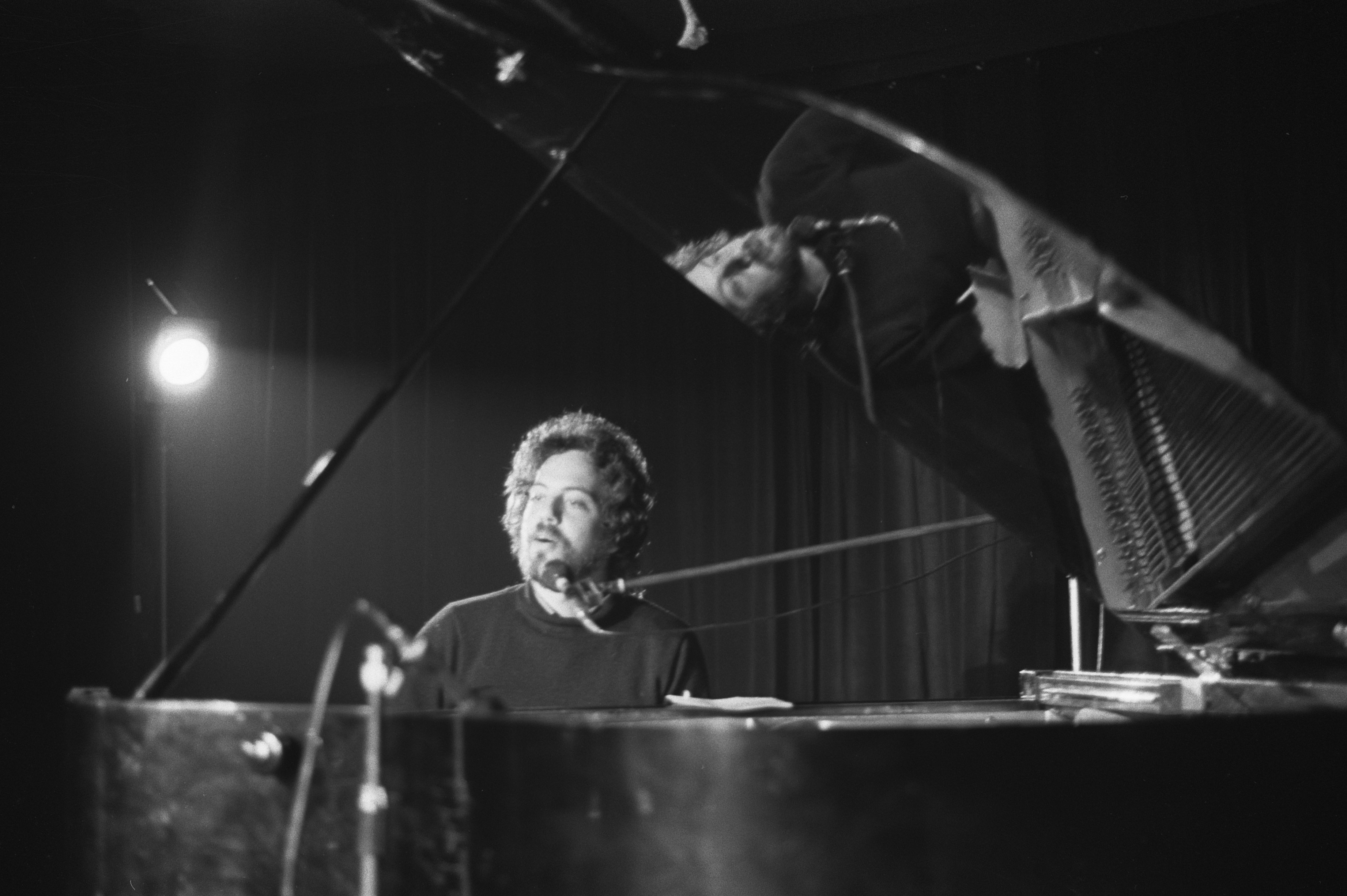 Collectie / Archief : Fotocollectie Anefo Reportage / Serie : [ onbekend ] Beschrijving : Nieuwste artiesten bij Phonogram, Billy Joel Datum : 13 september 1972 Trefwoorden : pianos, zangers Instellingsnaam : Phonogram Fotograaf : Mieremet, Rob / Anefo Auteursrechthebbende : Nationaal Archief Materiaalsoort : Negatief (zwart/wit) Nummer archiefinventaris : bekijk toegang 2.24.01.05 Bestanddeelnummer : 925-8727